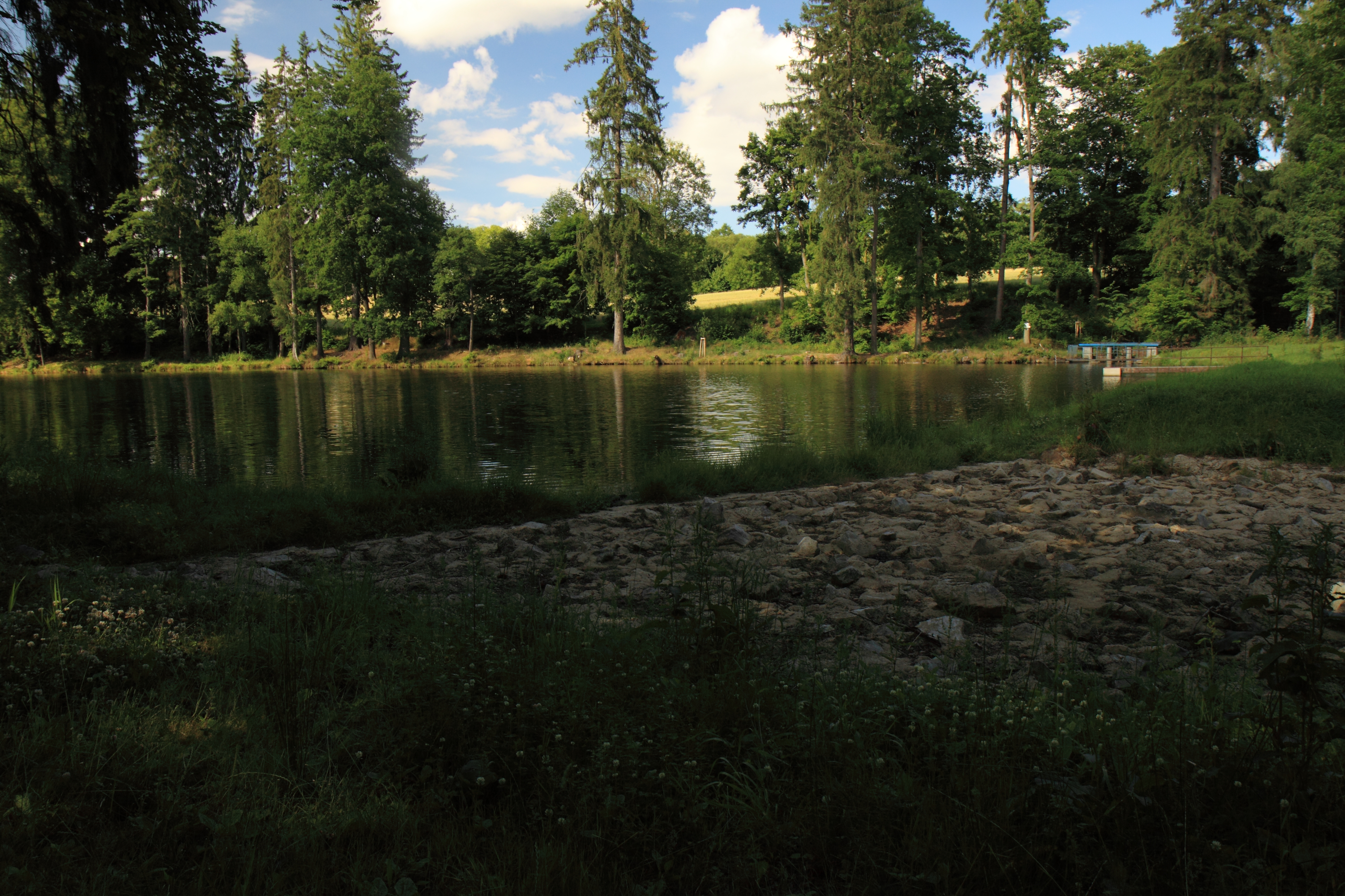 Hráz rybníka Loudal v Těchobuzi